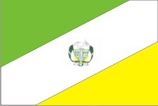 La bandera es de forma rectangular y de tres franjas, dos triangulos, uno de color verde heráldico en el extremo superior izquierdo, y otro de color amarillo en el extremo inferior derecho. Entre los dos va un hexagágono rectangular de color blanco, que lleva estampado en el centro el escudo de San Andrés. El color verde simboliza la esperanza, la lectura y la constancia de sus gentes. el vigor y robustez de la juventud sanandreseña, y el verde de sus campos. "El color blanco sinifica la lealtad, franqueza y rectitud de las gentes; la pureza y fe de la mujer y la paz de que disfruta el municipio. El escudo colocado en el centro del exágono blanco expresa la unión existente entre el conglomerado sanandreseño, su religiosidad y su cultura".